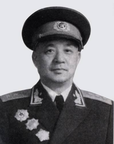 王建安，中华人民共和国中国人民解放军将领、上将。